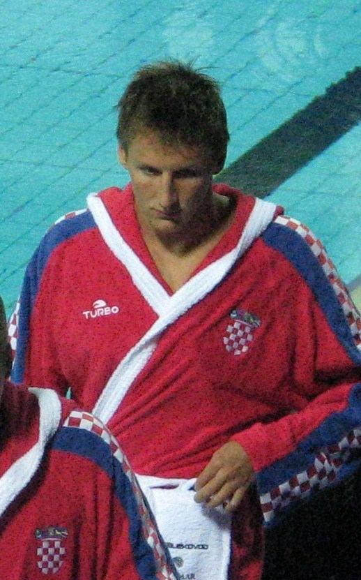 Sandro Sukno